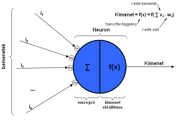 Egy mesterséges neuron vázlatos rajza